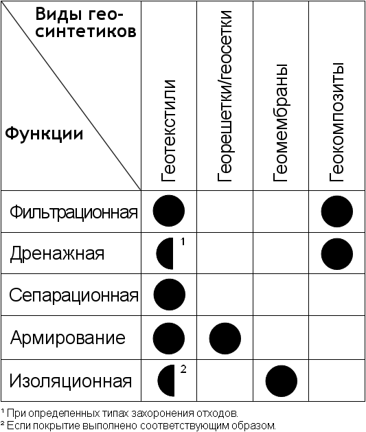 Пригодность различных видов геосинтетиков для выполнения тех или иных функций.